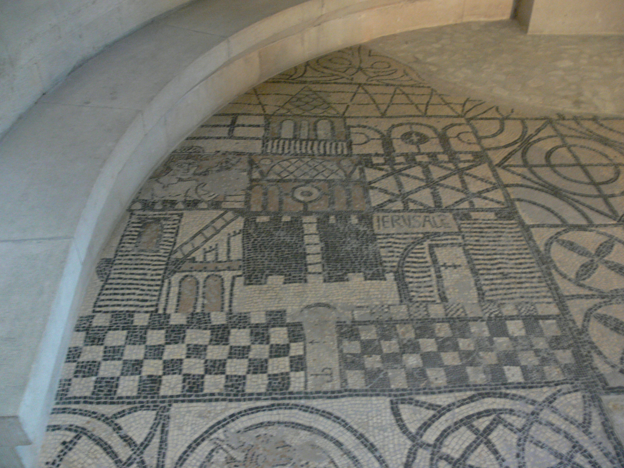 Saint-Paul-Trois-Châteaux - cathédrale